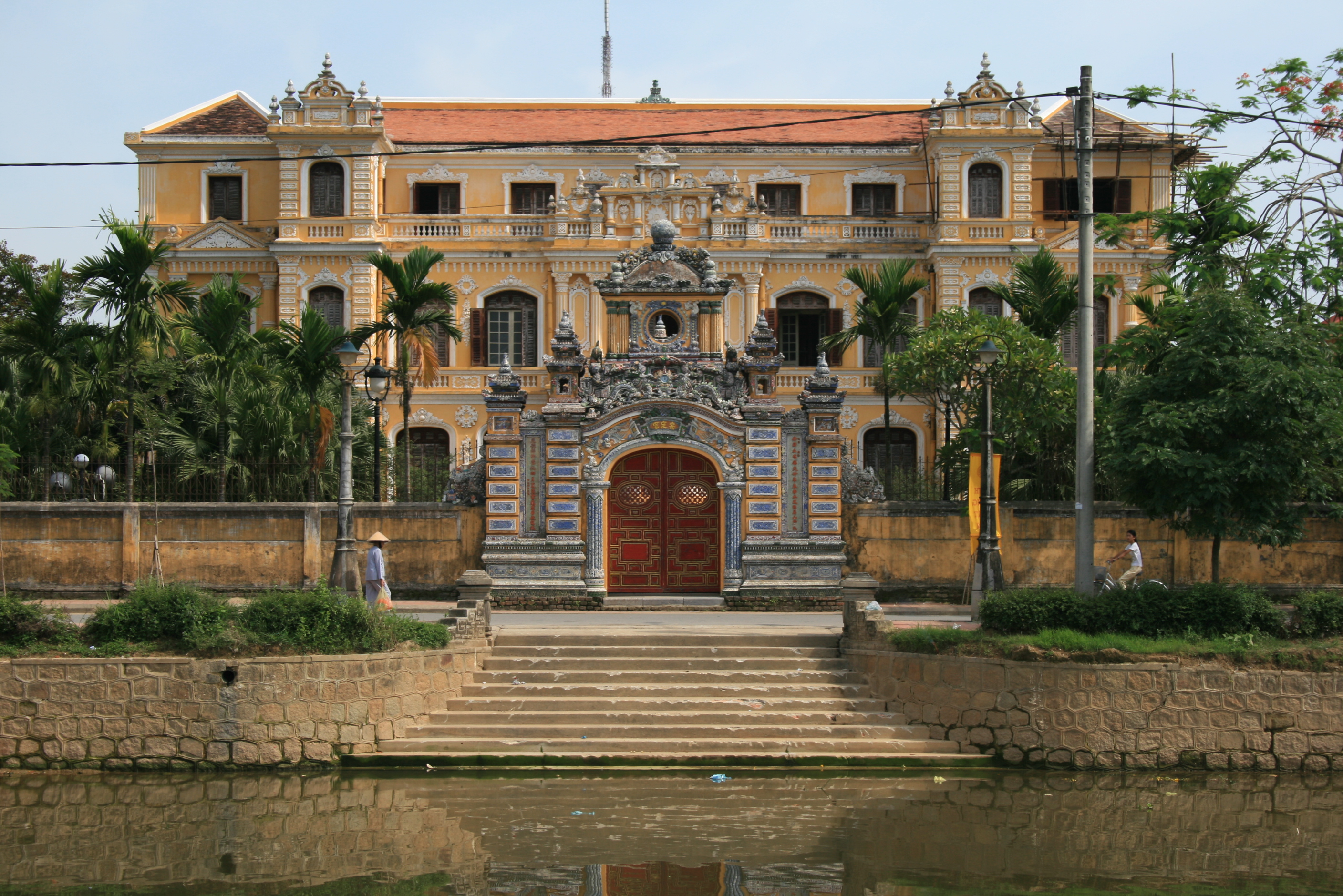 An Dinh Residence, Hue, Vietnam